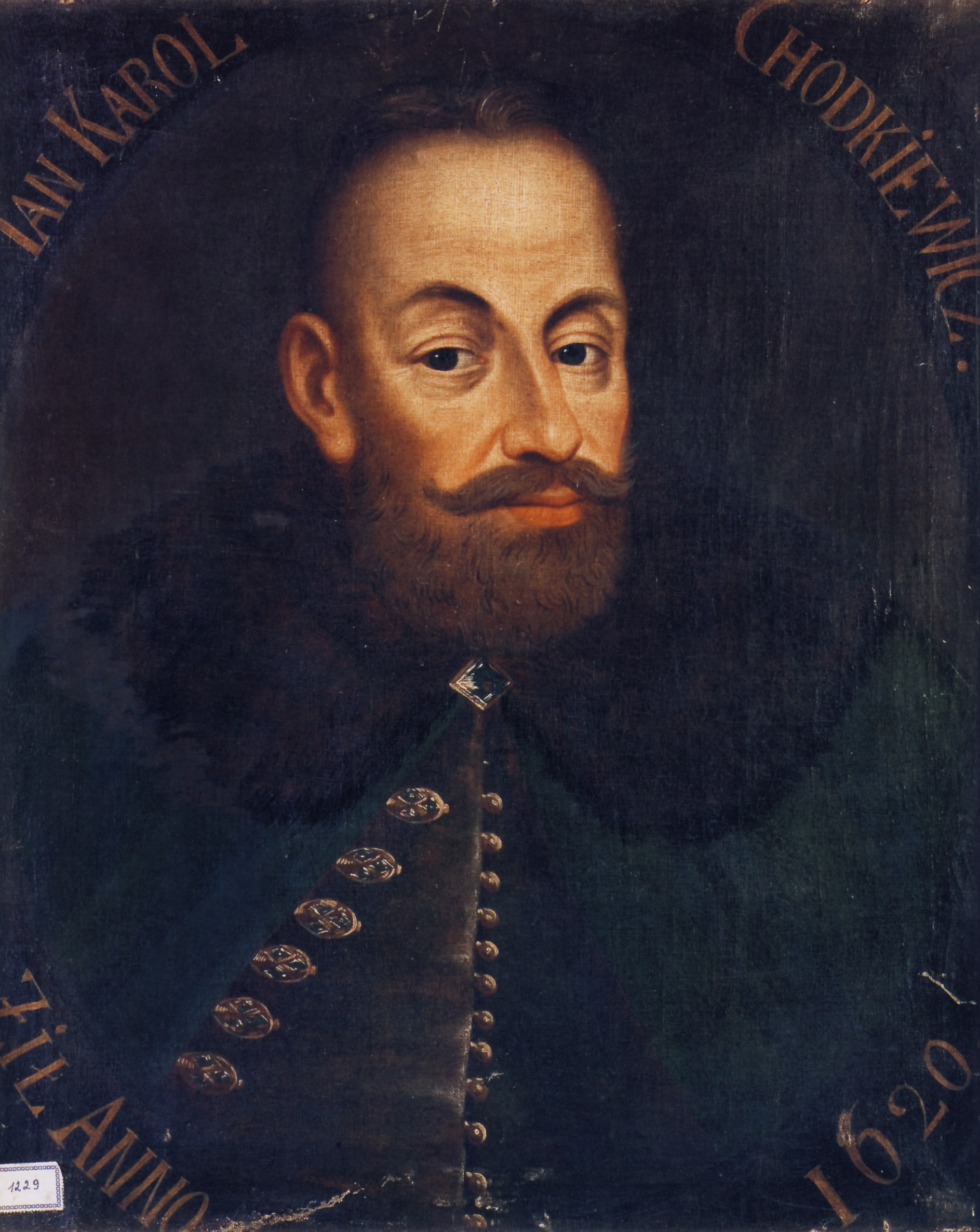 Беларуская (тарашкевіца): Партрэт Яна Караля Хадкевіча (Jan Karal Chadkievič)